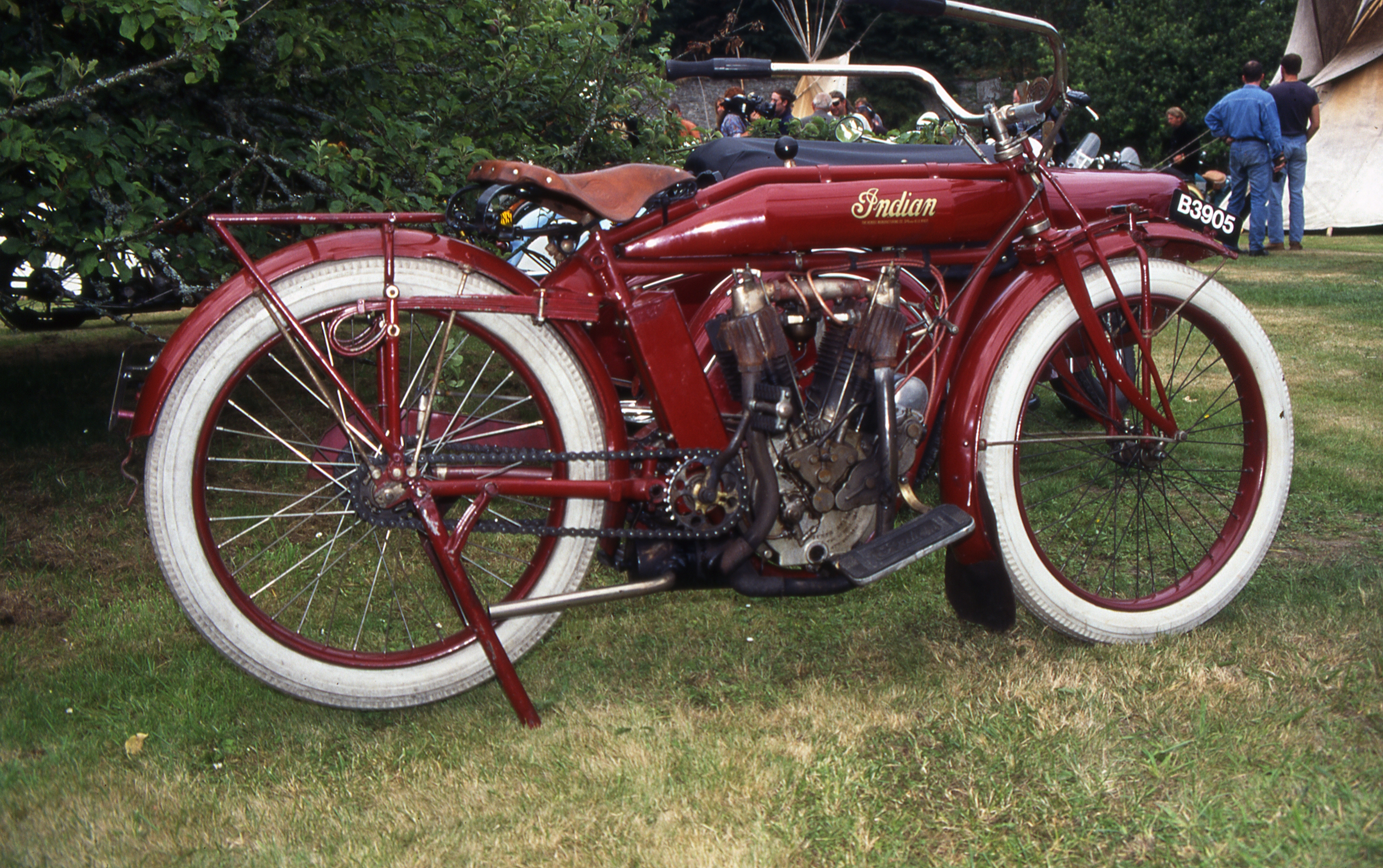 Indian Big Twin 70E 1913, V2 998 ccm wechselgesteuert